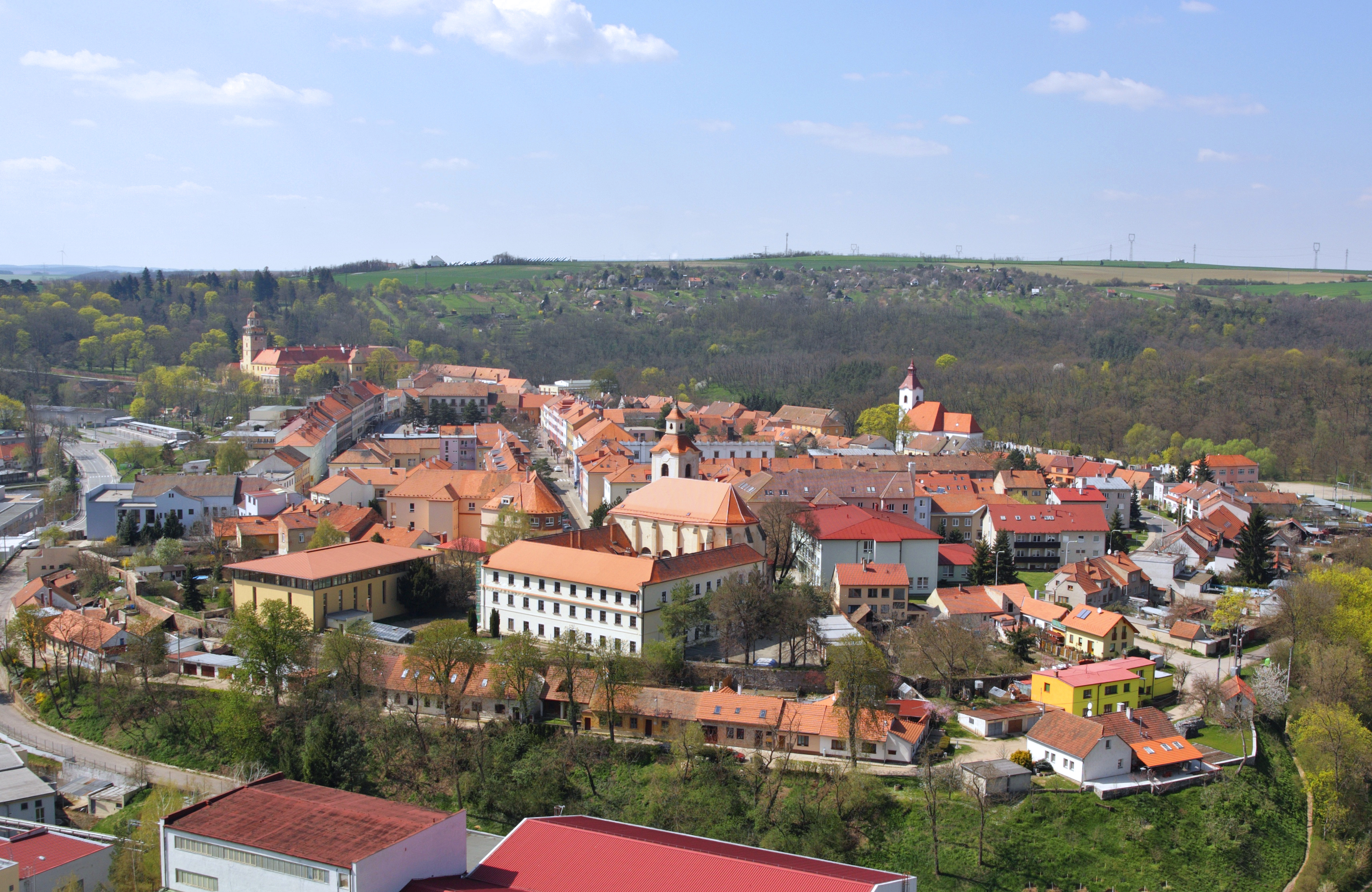 Moravský Krumlov - panorama od kaple svatého Floriána.